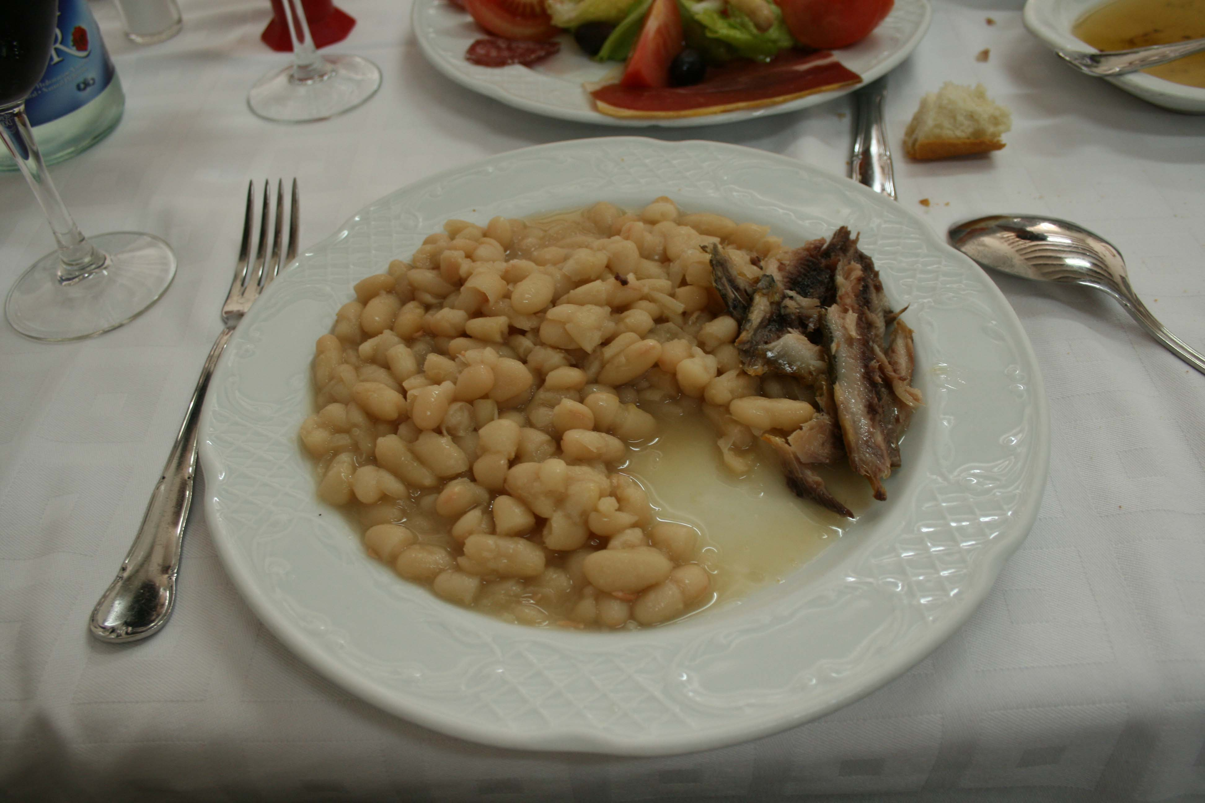 Judías blancas cocidas y servidas con sardina rancia (despiezada a la derecha) - Especialidad de la Fonda Alcalá - Calaceite - Teruel